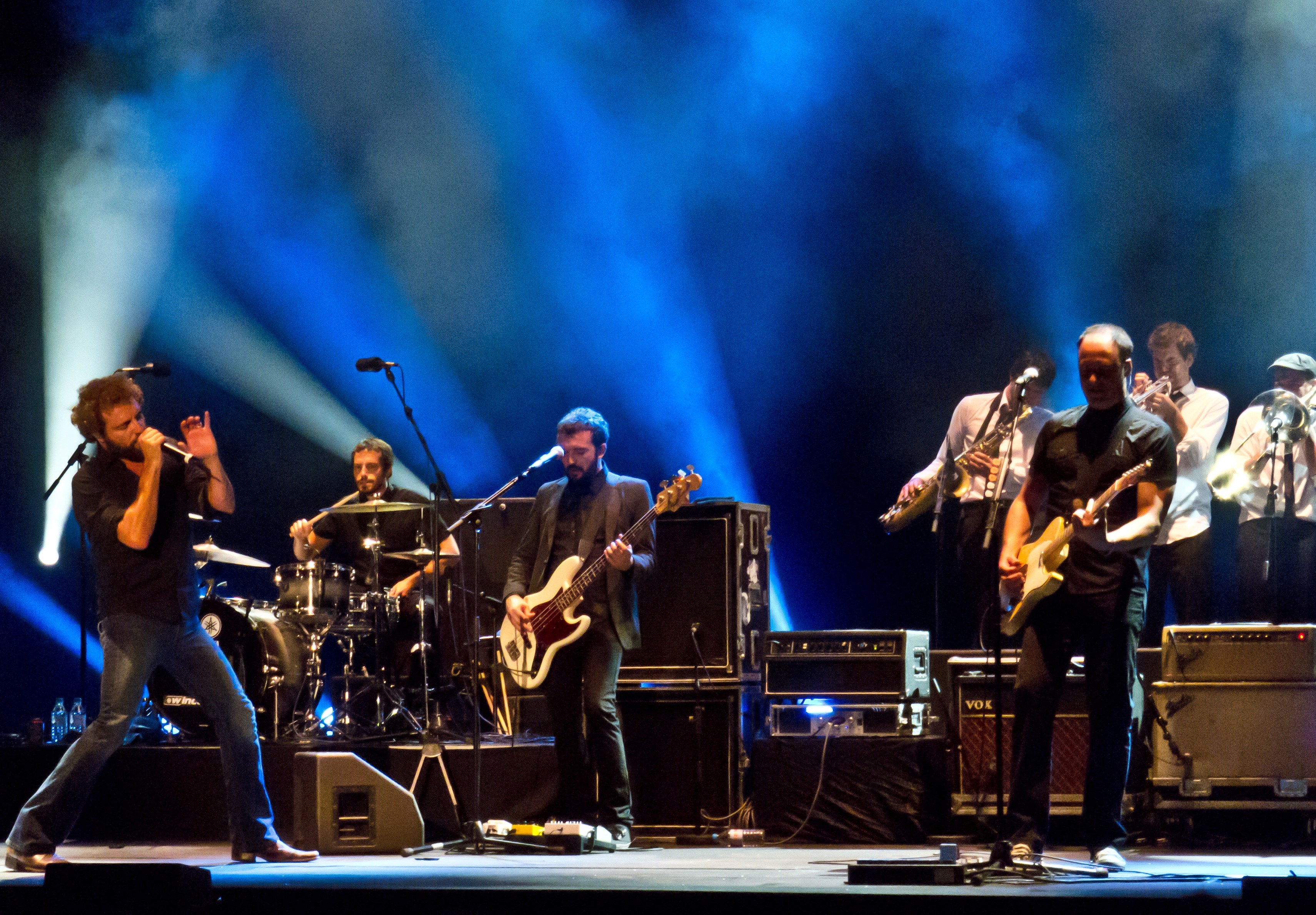 M Clan durante un concierto en Madrid en 2011.